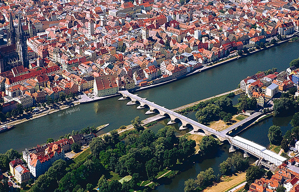 Légifotó Gyukics Pétertől a Duna legrégebbi állandó hídjáról. A regensburgi Steinerne Brücke-t 1135-46 között építették. [1] , * [2] , * [3]